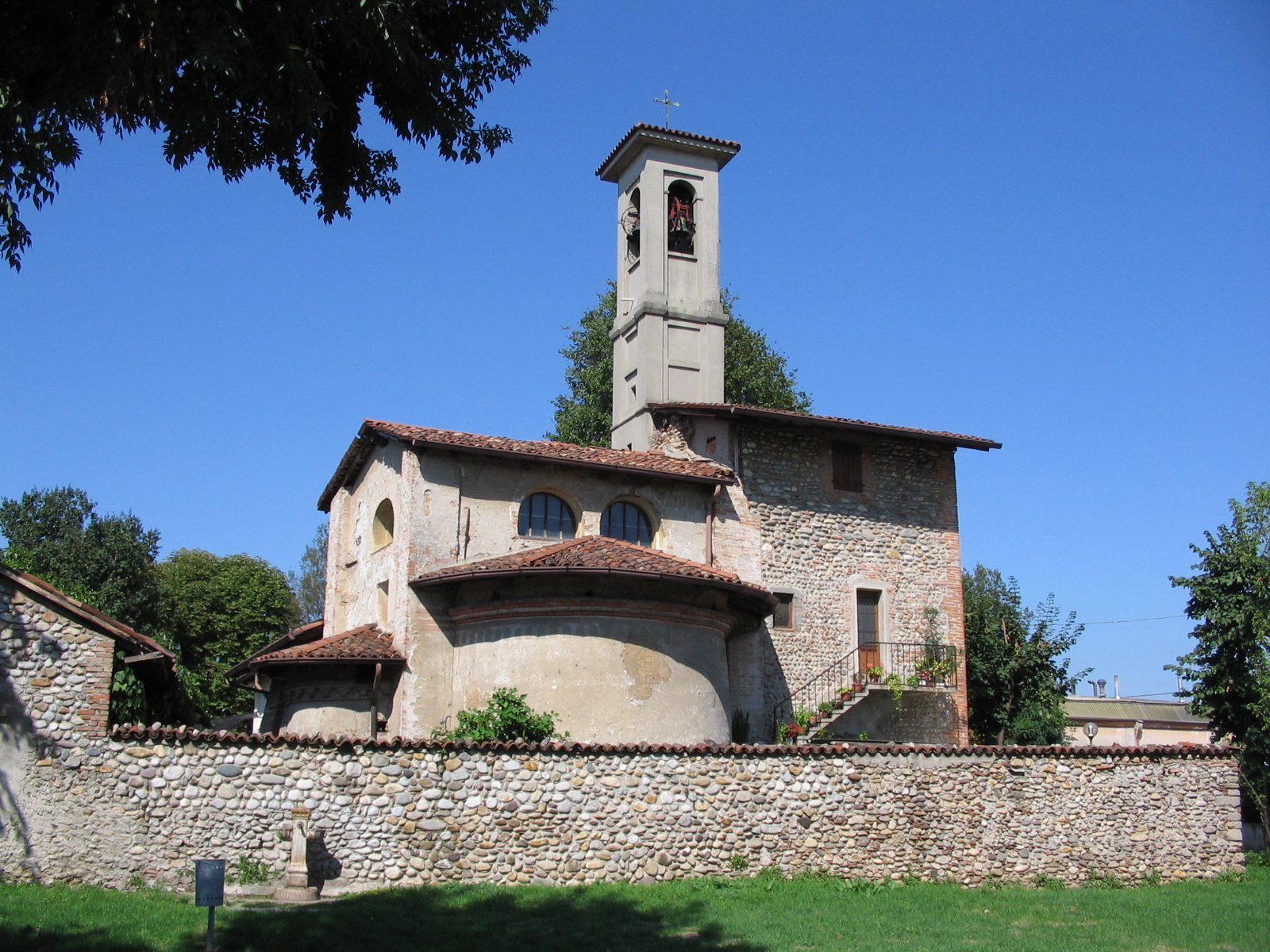 Description=Santuario della Madonna dell'Olmo di Verdellino, sito nel comune di Verdellino.